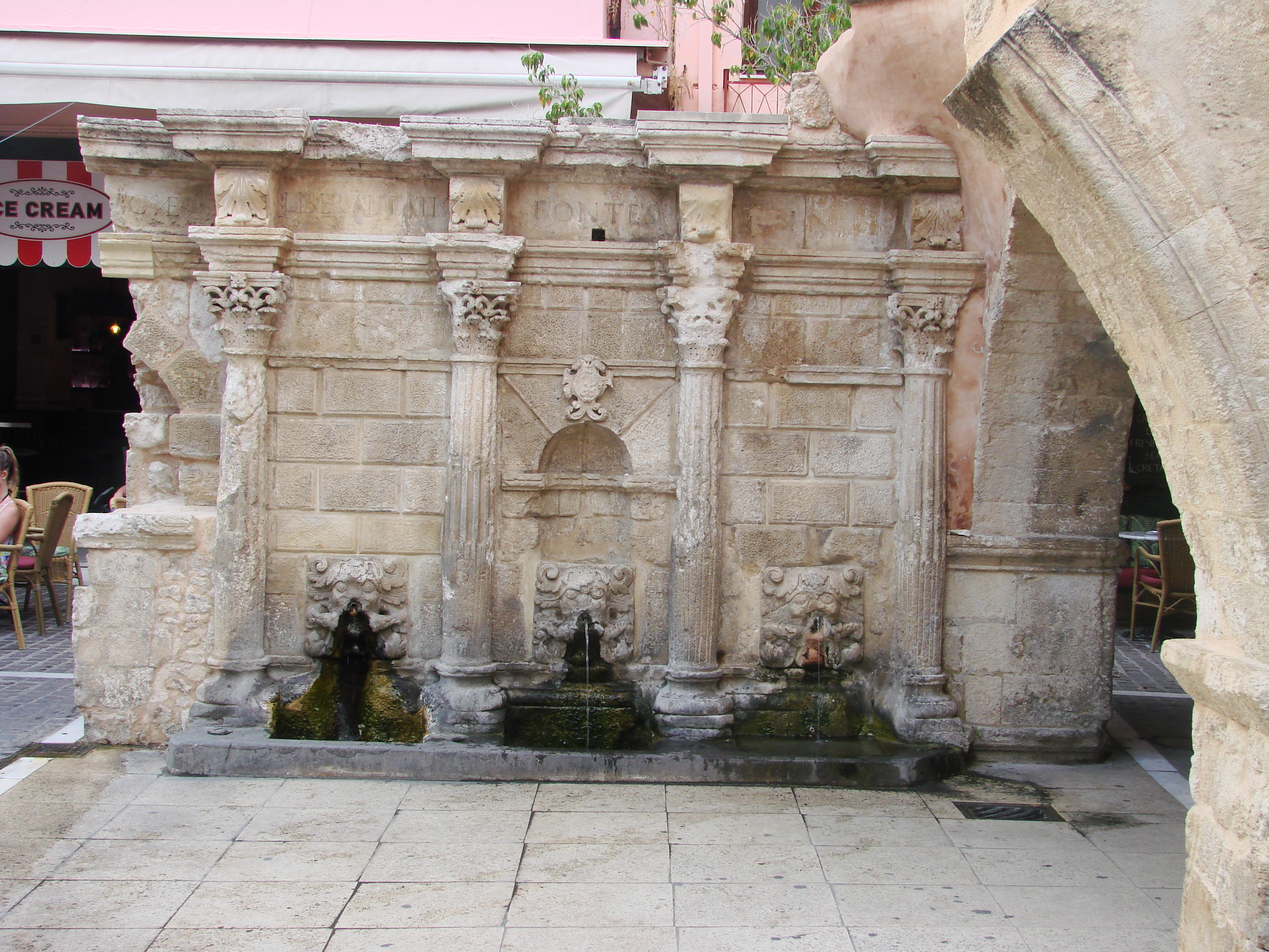 Ενετική κρήνη Ριμόντι«Κρήνη Ριμόντι»